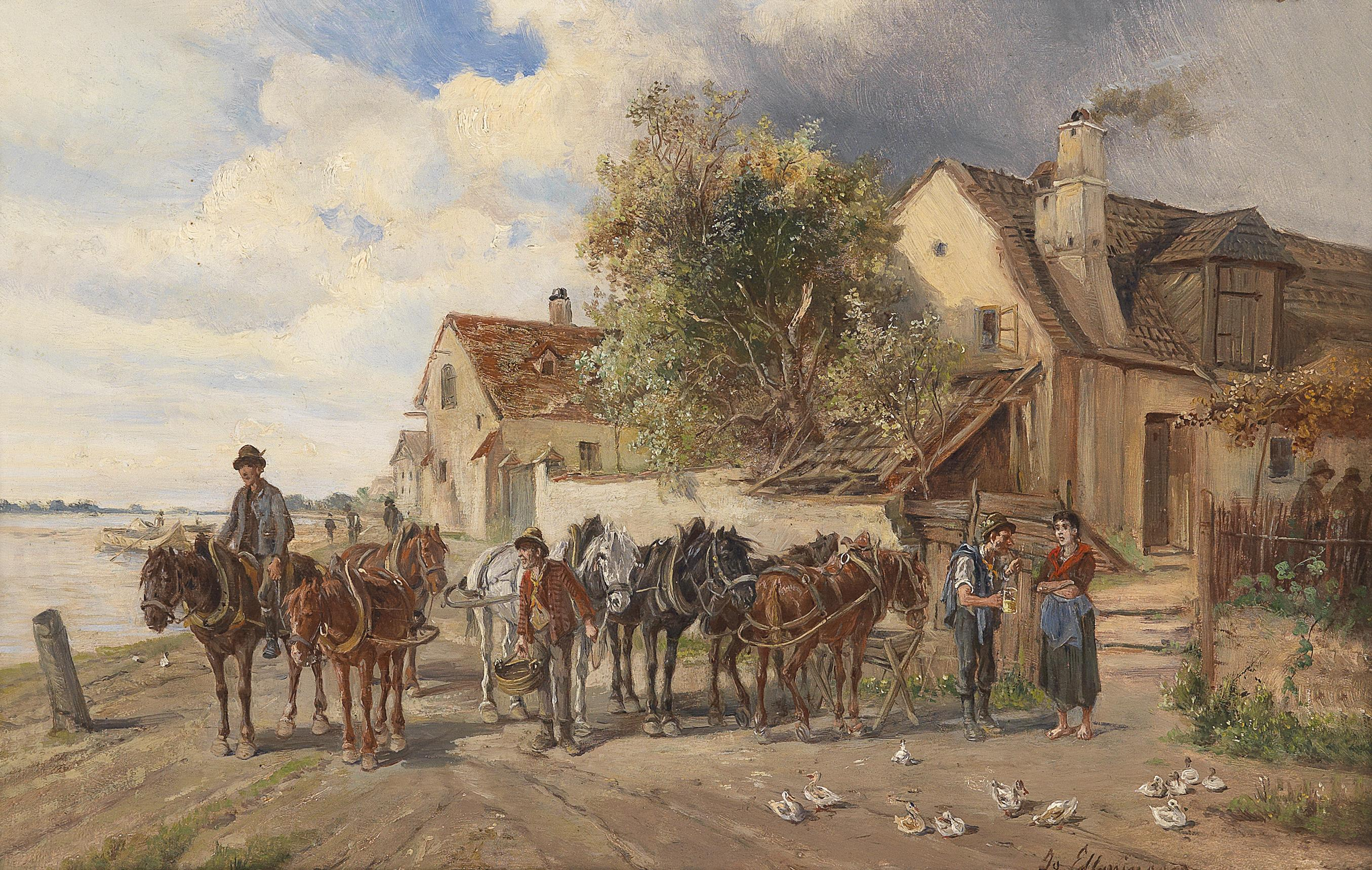 Treidelpferde am Flussufertitle QS:P1476,de:"Treidelpferde am Flussufer" label QS:Lde,"Treidelpferde am Flussufer"